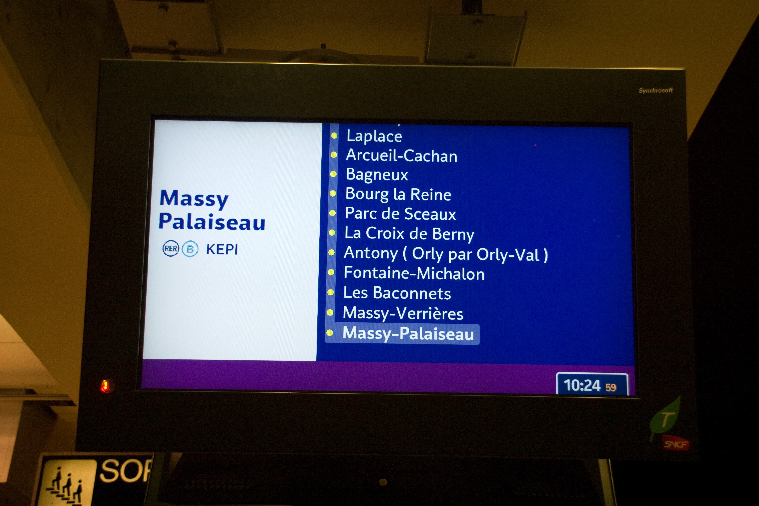 Gare du Nord, Paris, France